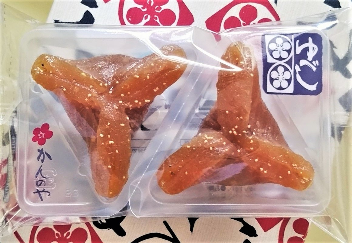 家伝ゆべし１パック2018年8月6日自宅にてスマホ撮影